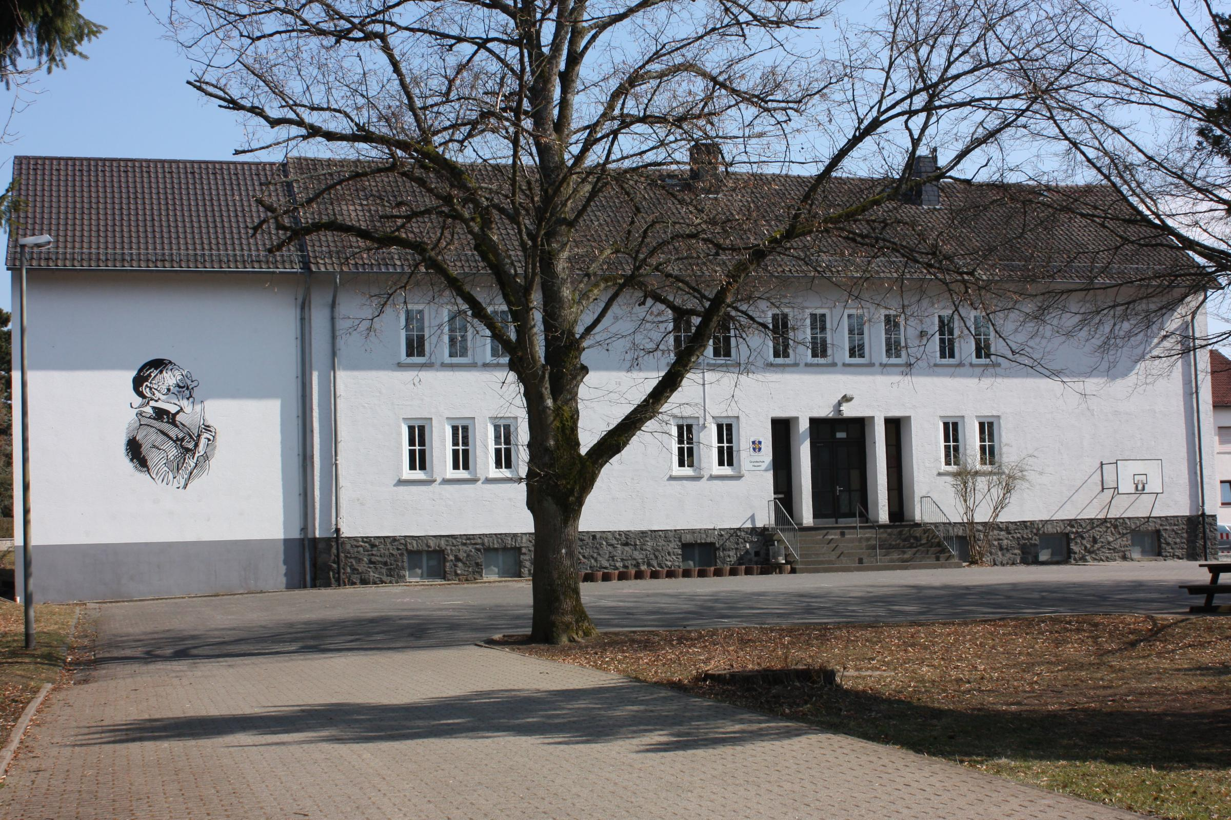 Grundschule und ehemalige Volksschule in Hausen, Westerwald (Waldbrunn), Hessen, Deutschland. Erbaut 1954/55